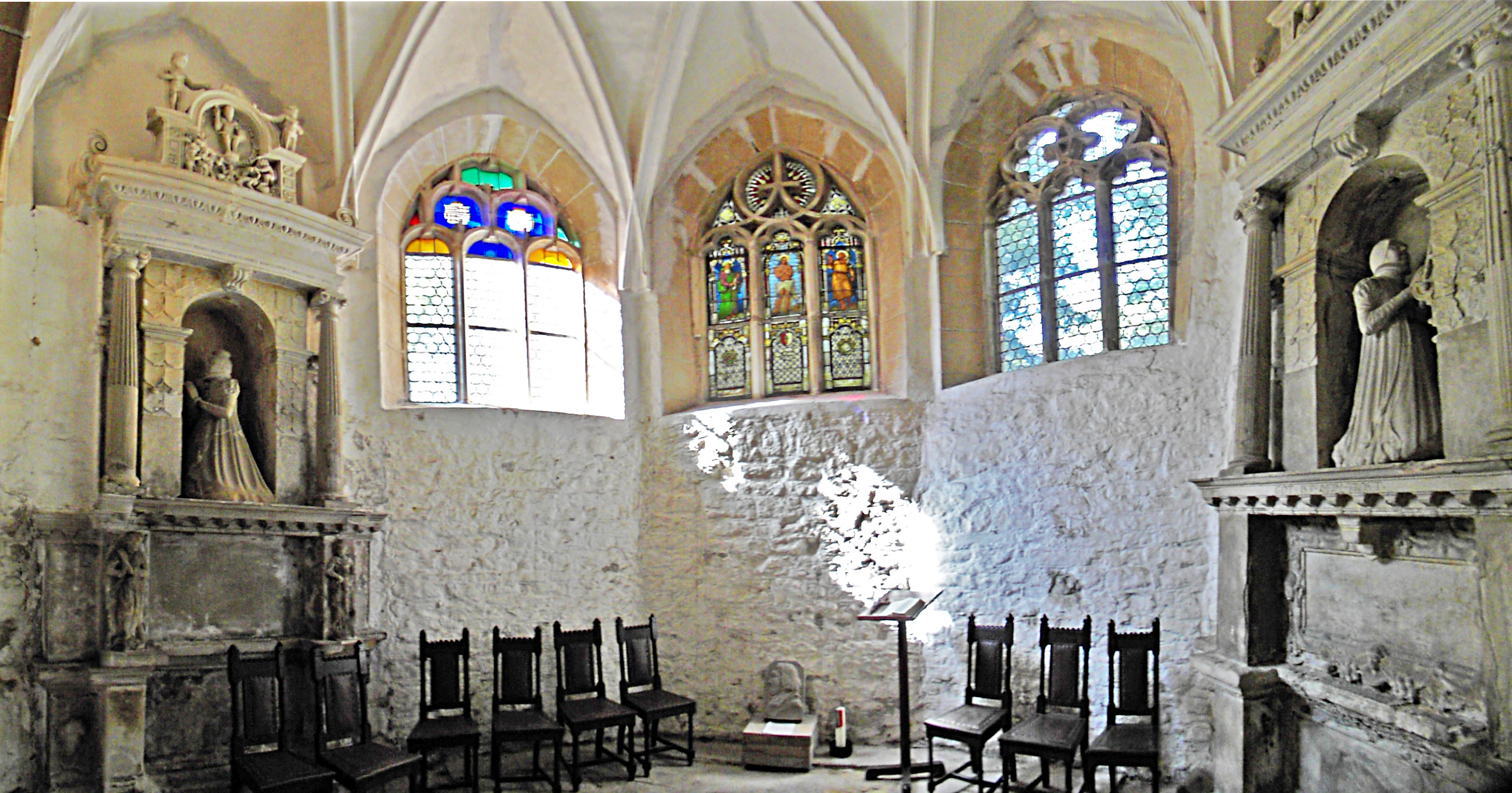 fürstliche Gruftkapelle an der Westseite